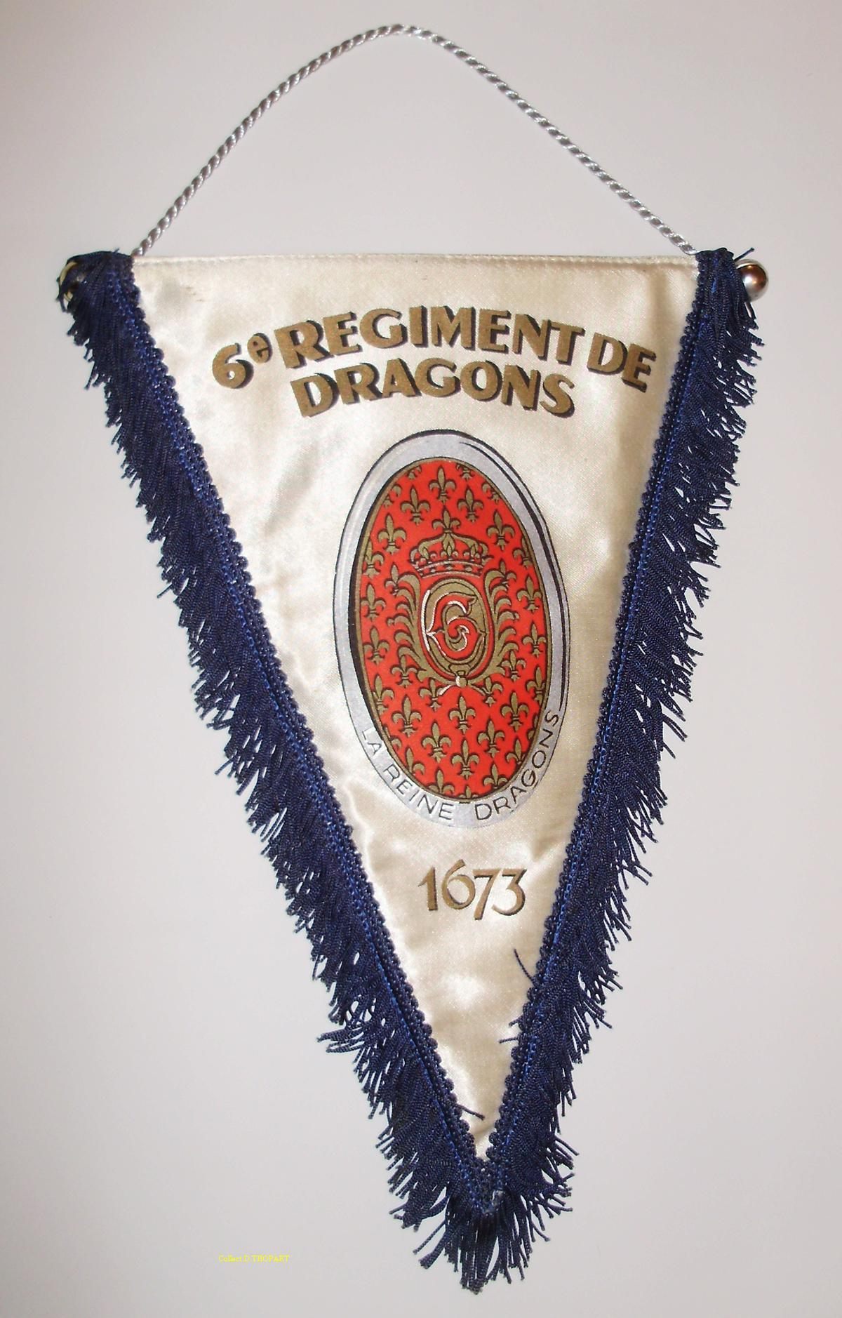 fanion du 6eme Dragons à Saarburg